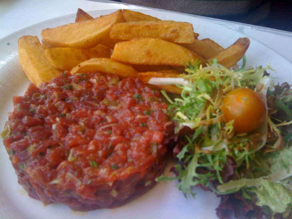 Steak tartar